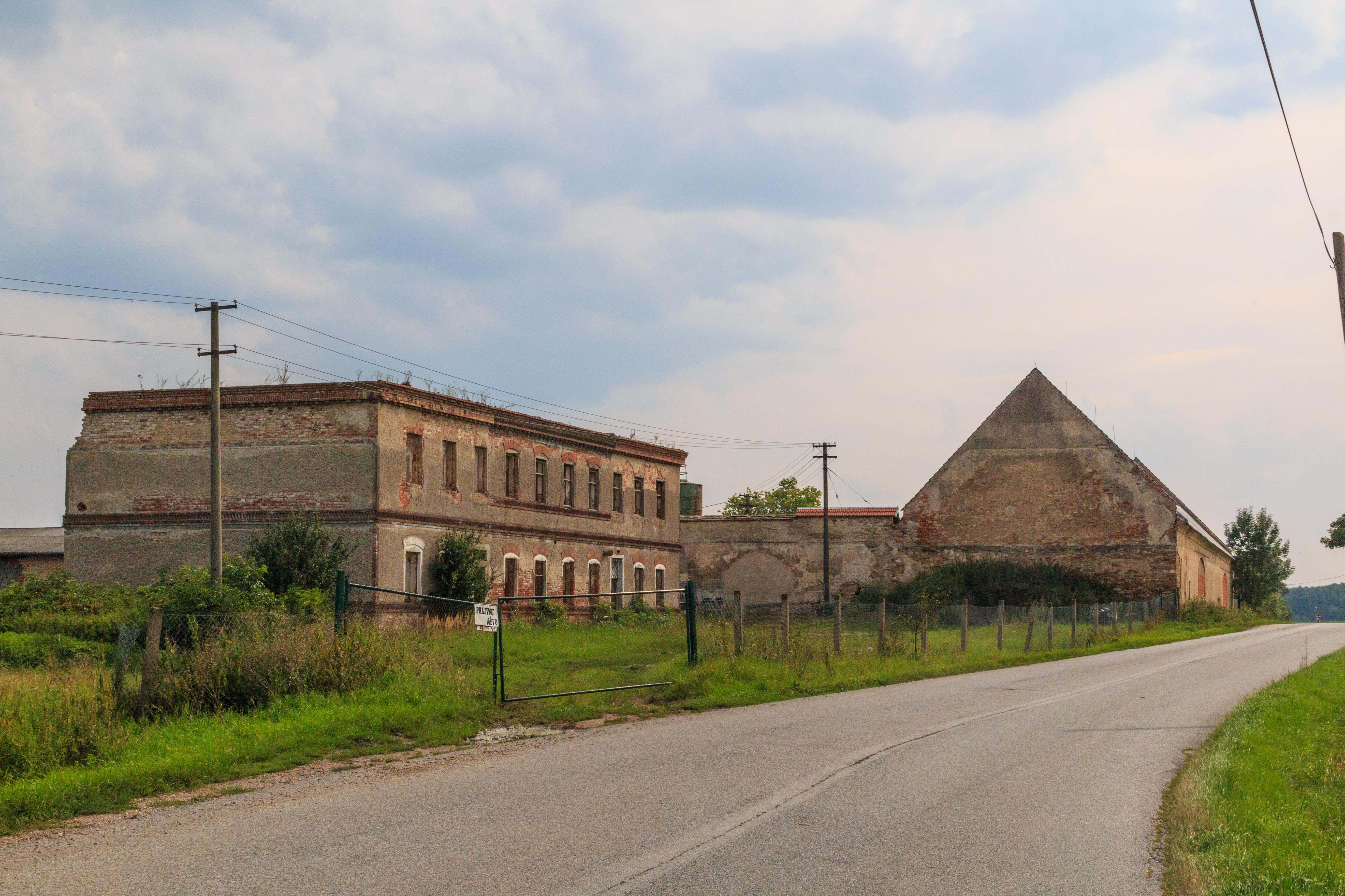 Dvůr Vranov u Českého Meziříčí